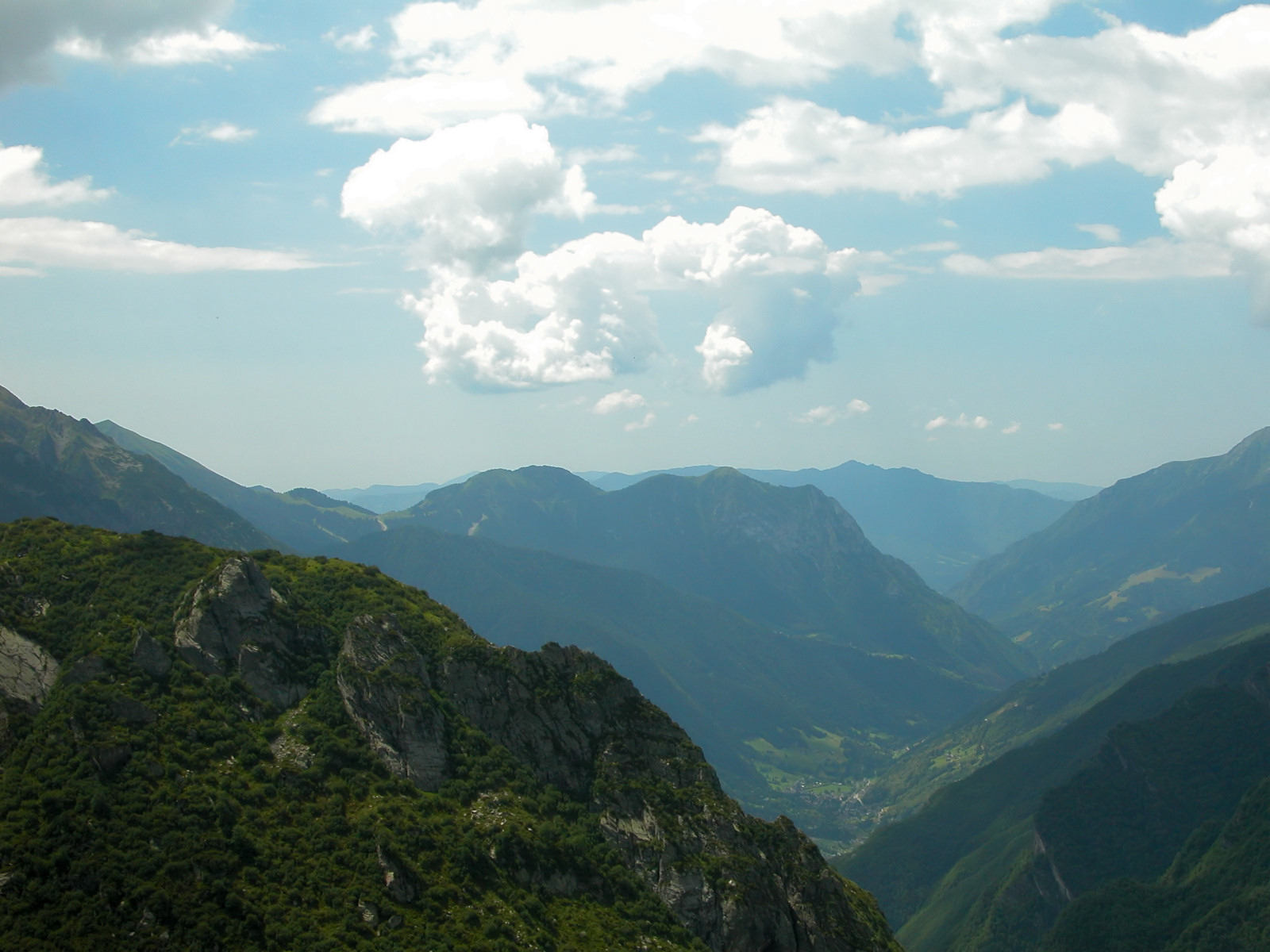 La Val Seriana vista dal Sentiero delle Orobie in prossimità del Rifugio Baroni al Brunone. Foto scattata da Yoruno.